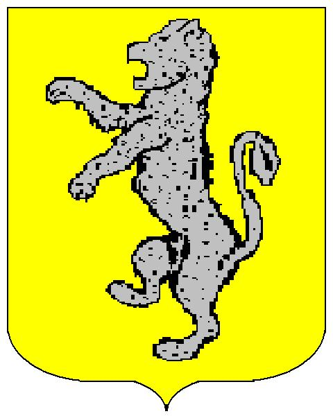 Grb obitelji Begna